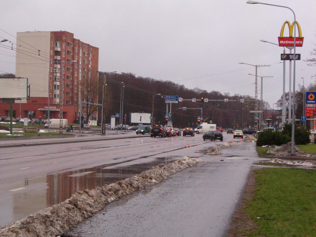 Sõpruse puiestee ja A. H. Tammsaare tee ristmik. Tallinn.